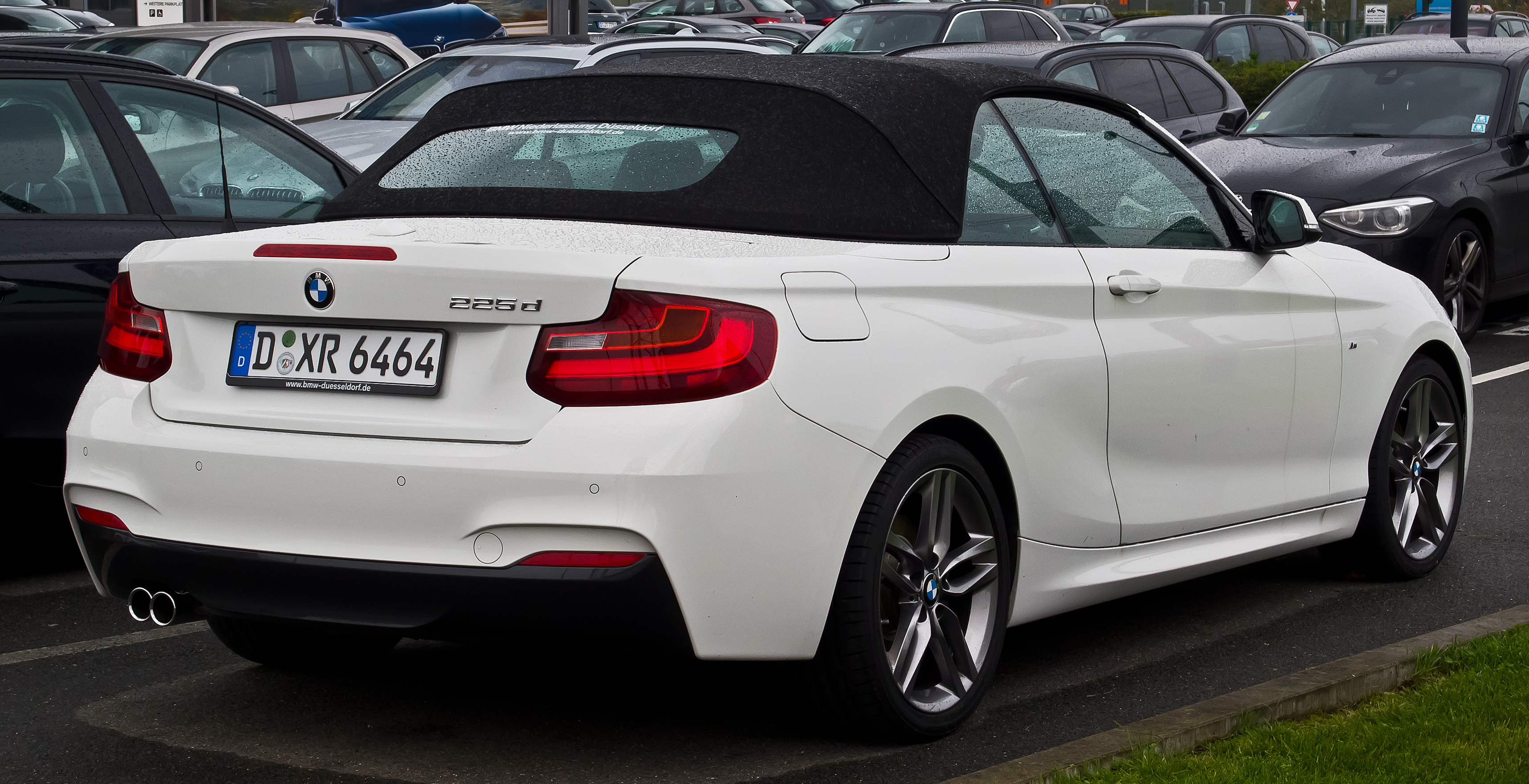 BMW 225d Cabriolet M Sport (F23)